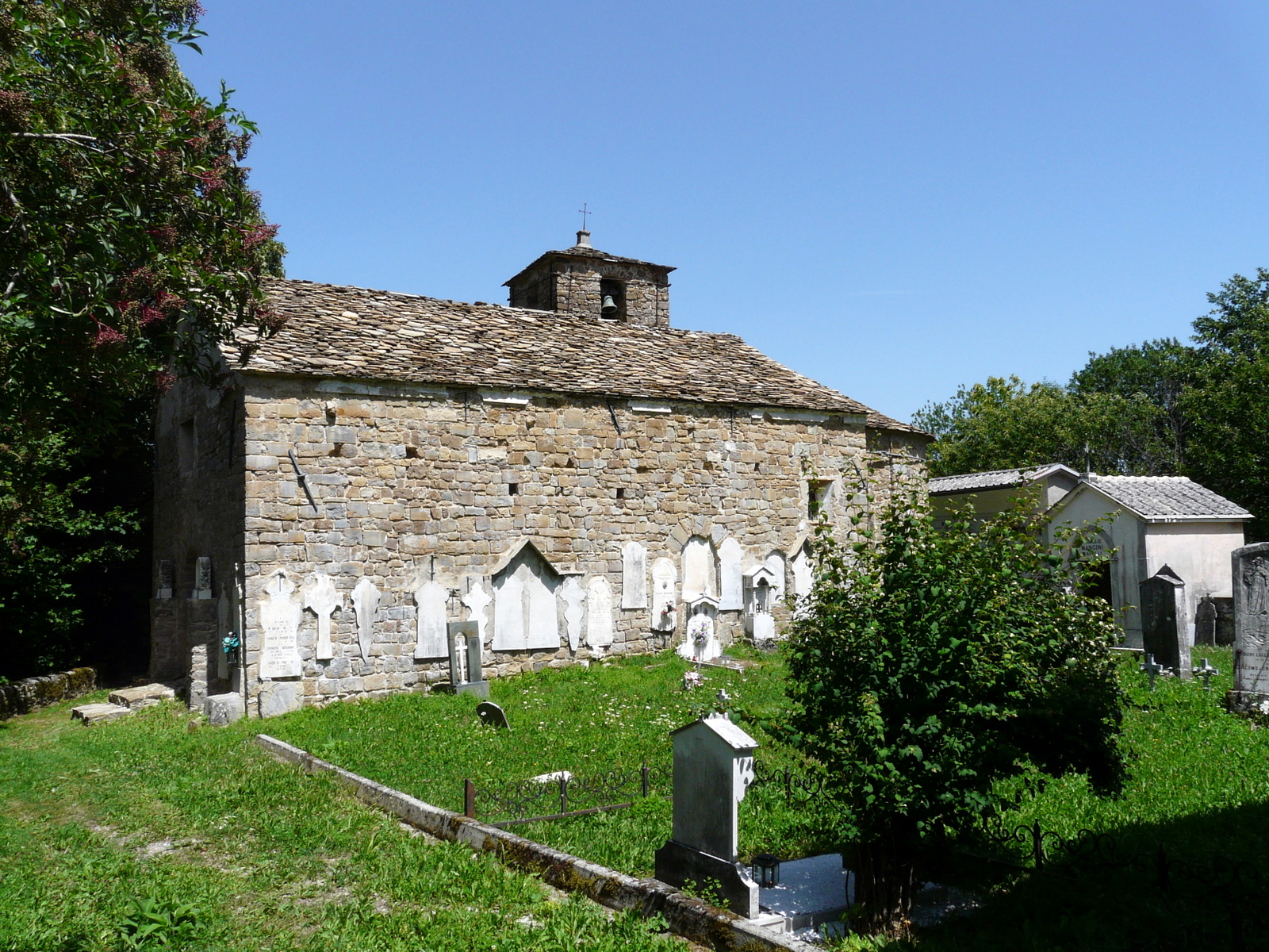 La chiesa di Santo Stefano, Fontanarossa, Gorreto, Liguria, Italia